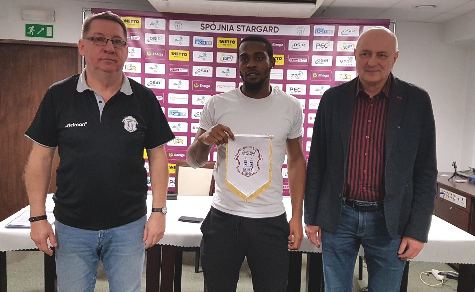 Podziękowanie od Spójni (18.01.2019)